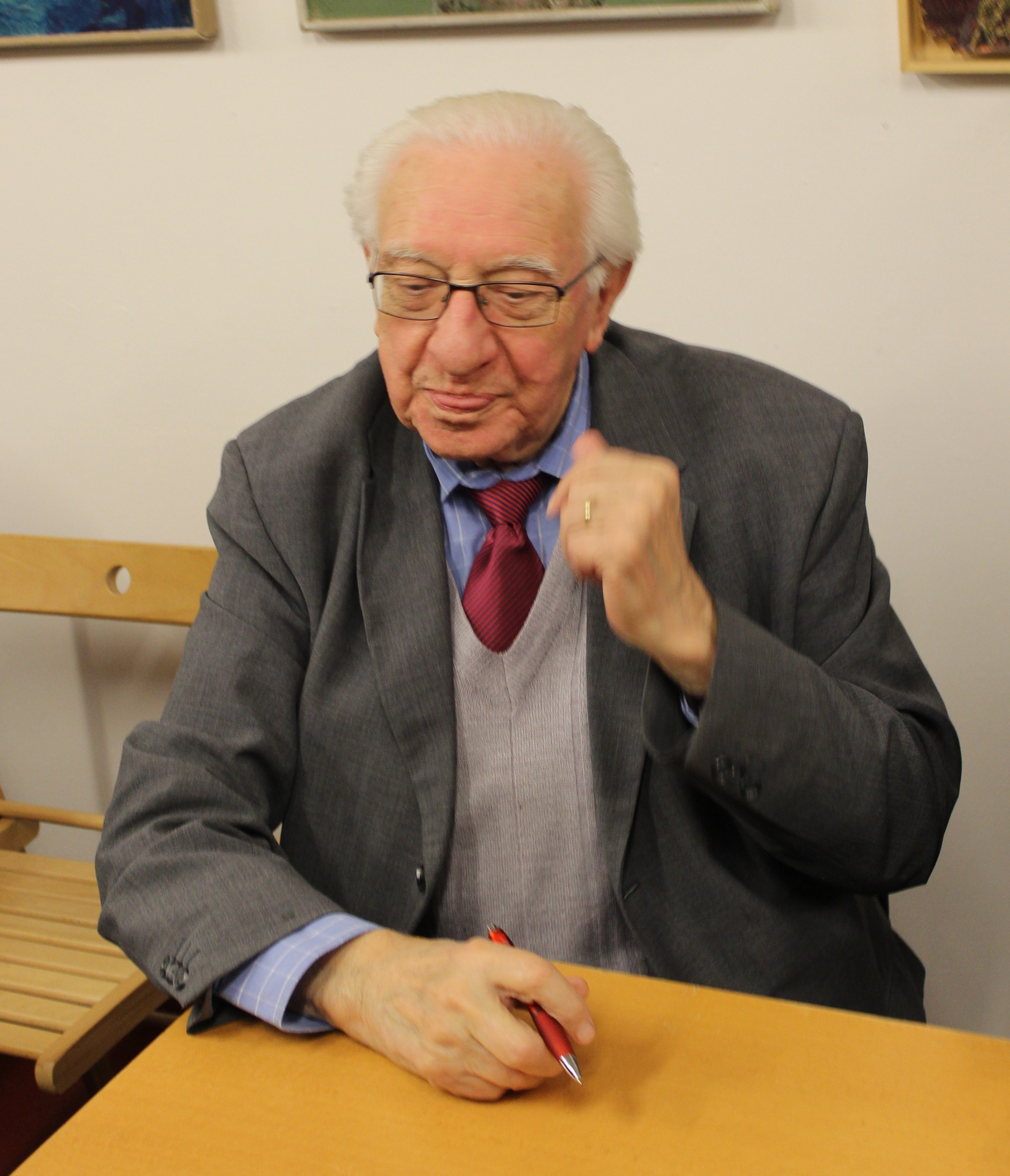 Gustav Oplustil na Maxiautogramiádě konané v pražské galerii Mánesova 54 péčí Vratislava Ebra.